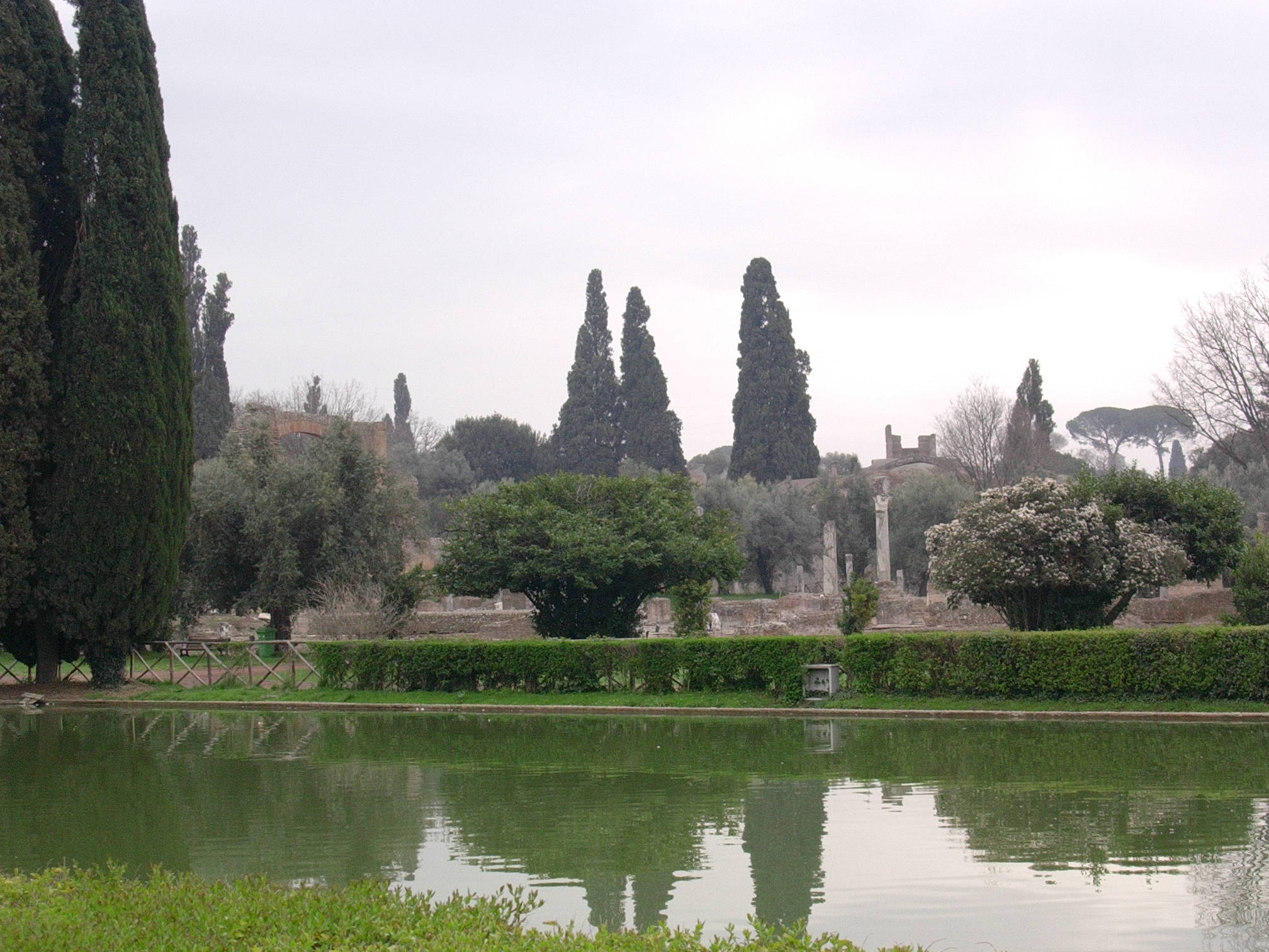 Vue paysagère de la villa Adriana Auteur: Guilhem Dulous